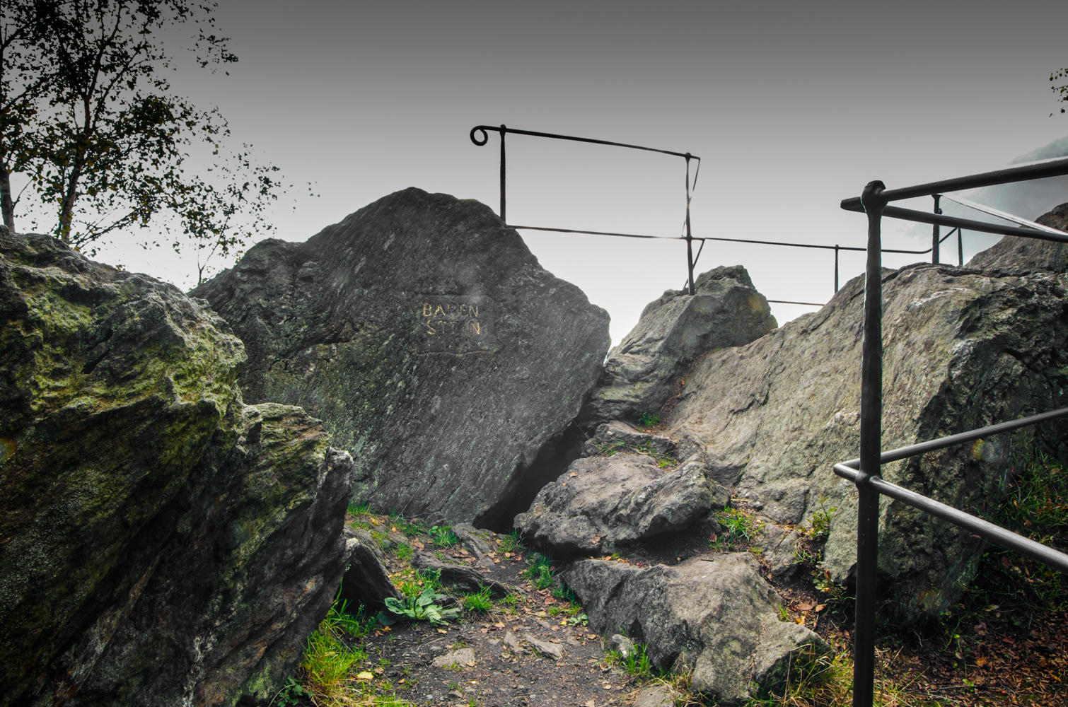 Evropsky významná lokalita Rychlebské hory-Sokolský hřbet, Medvědí kámen, okres Jeseník